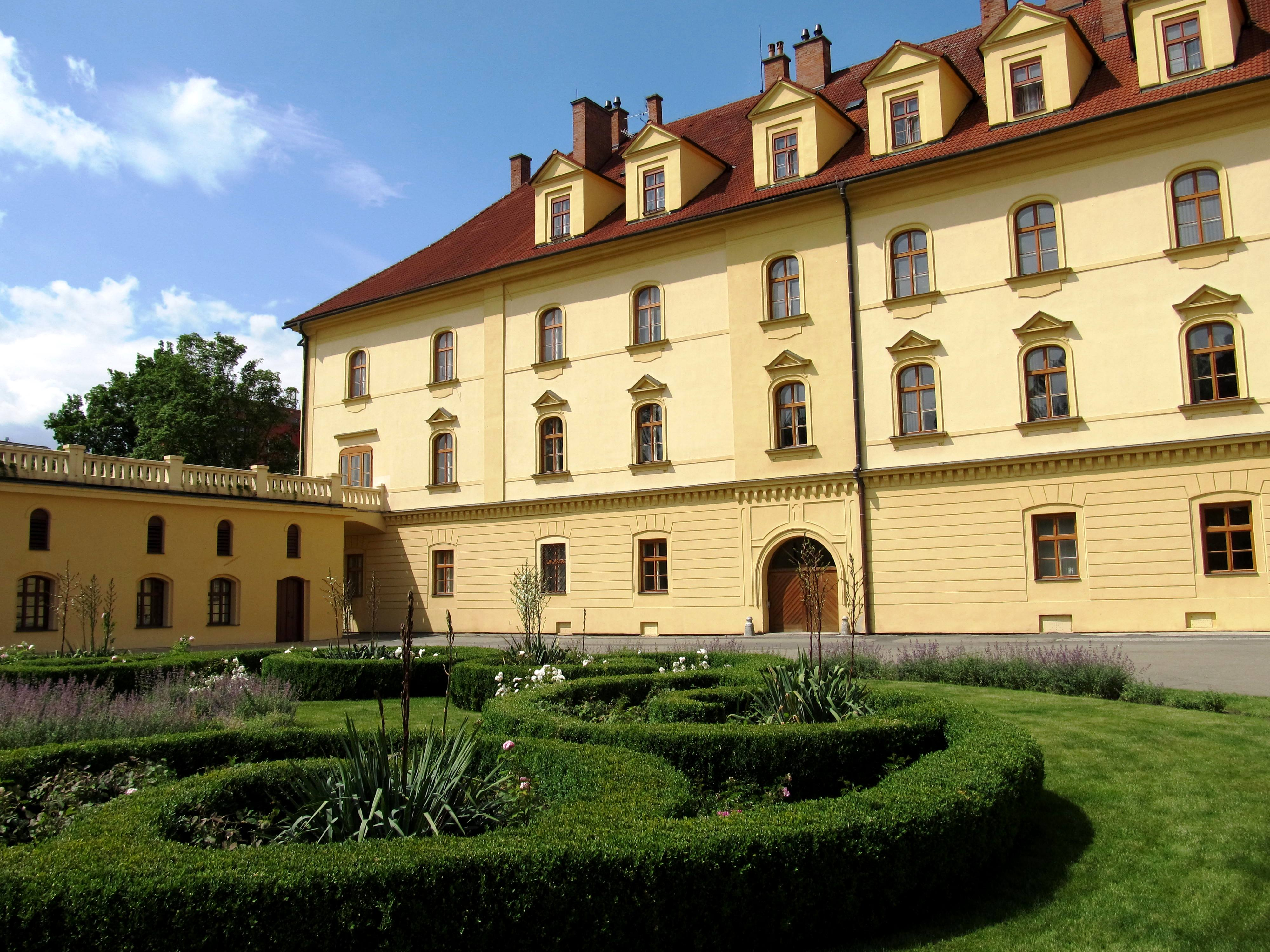 Zámek Lipník nad Bečvou nádvoří